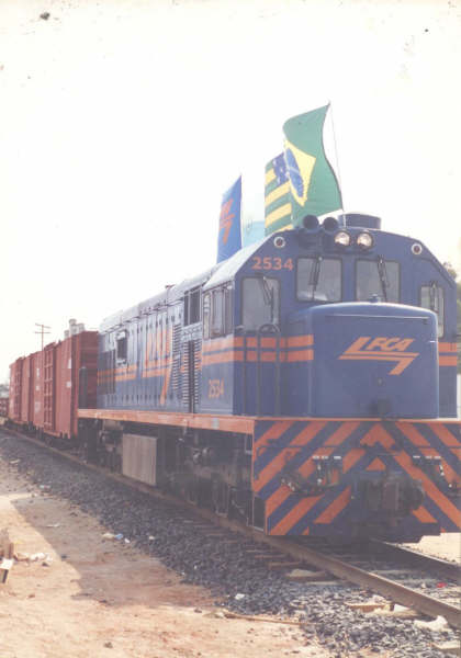 Uma lcomotiva da FCA